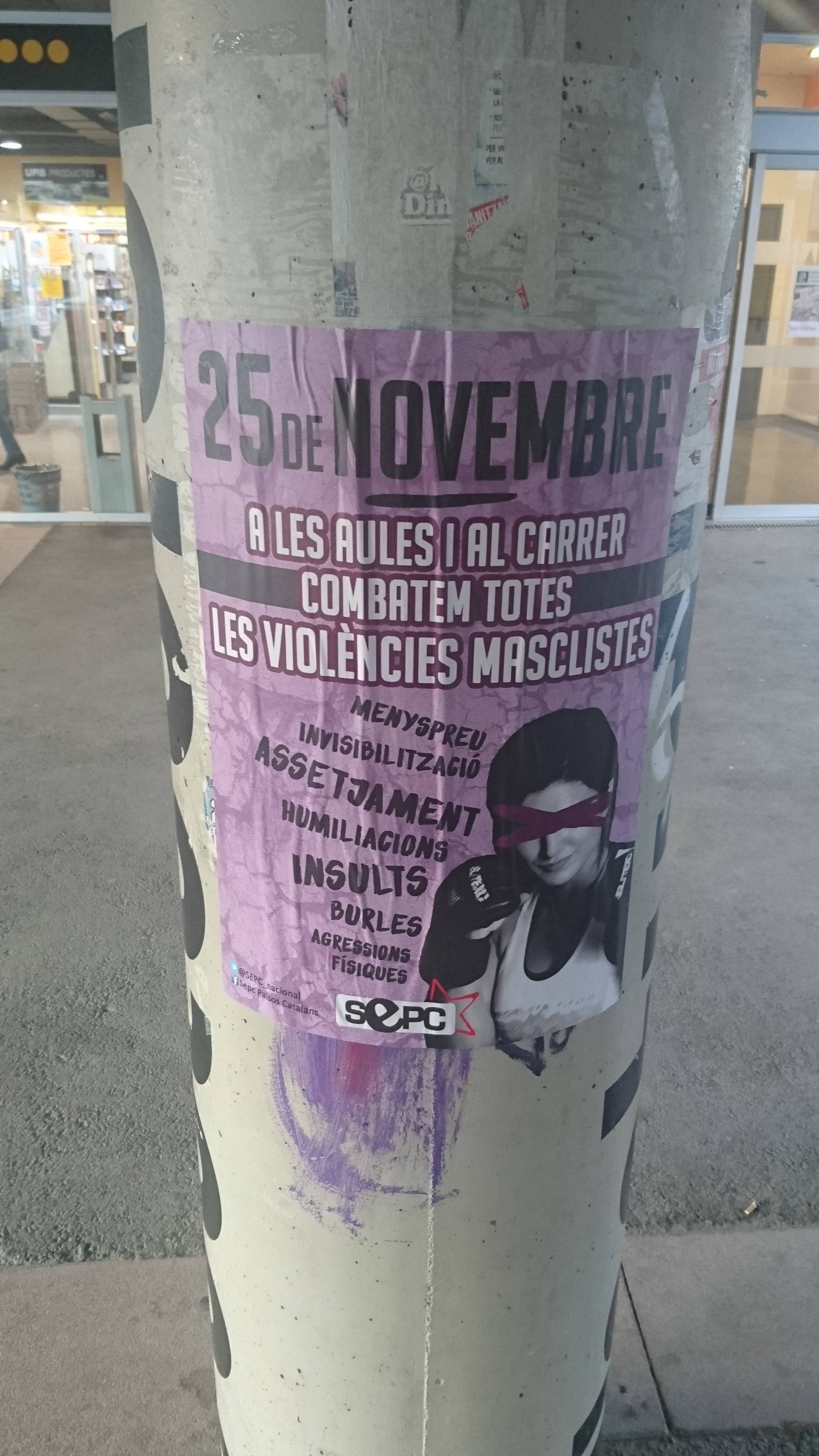 Cartell del Sindicat d'Estudiants dels Països Catalans, de l'any 2015 al campus de Bellaterra de la Universitat Autònoma de Barcelona, en motiu del Dia internacional per a l'eliminació de la violència contra la dones (25 de novembre).